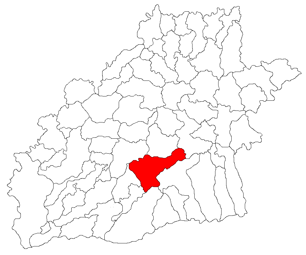 Categorie:Hărţi ale judeţului Sibiu